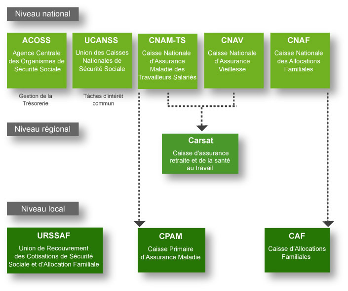 Organisation du régime général de Sécurité sociale français